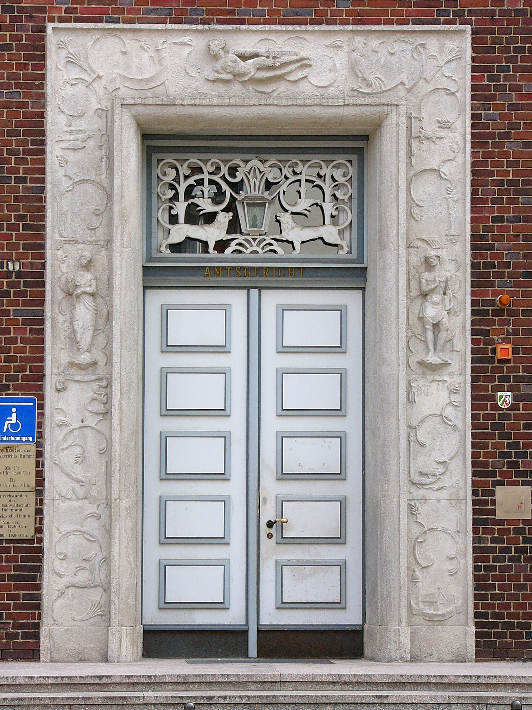 Amtsgericht Hamm This is a photograph of an architectural monument., no. 2